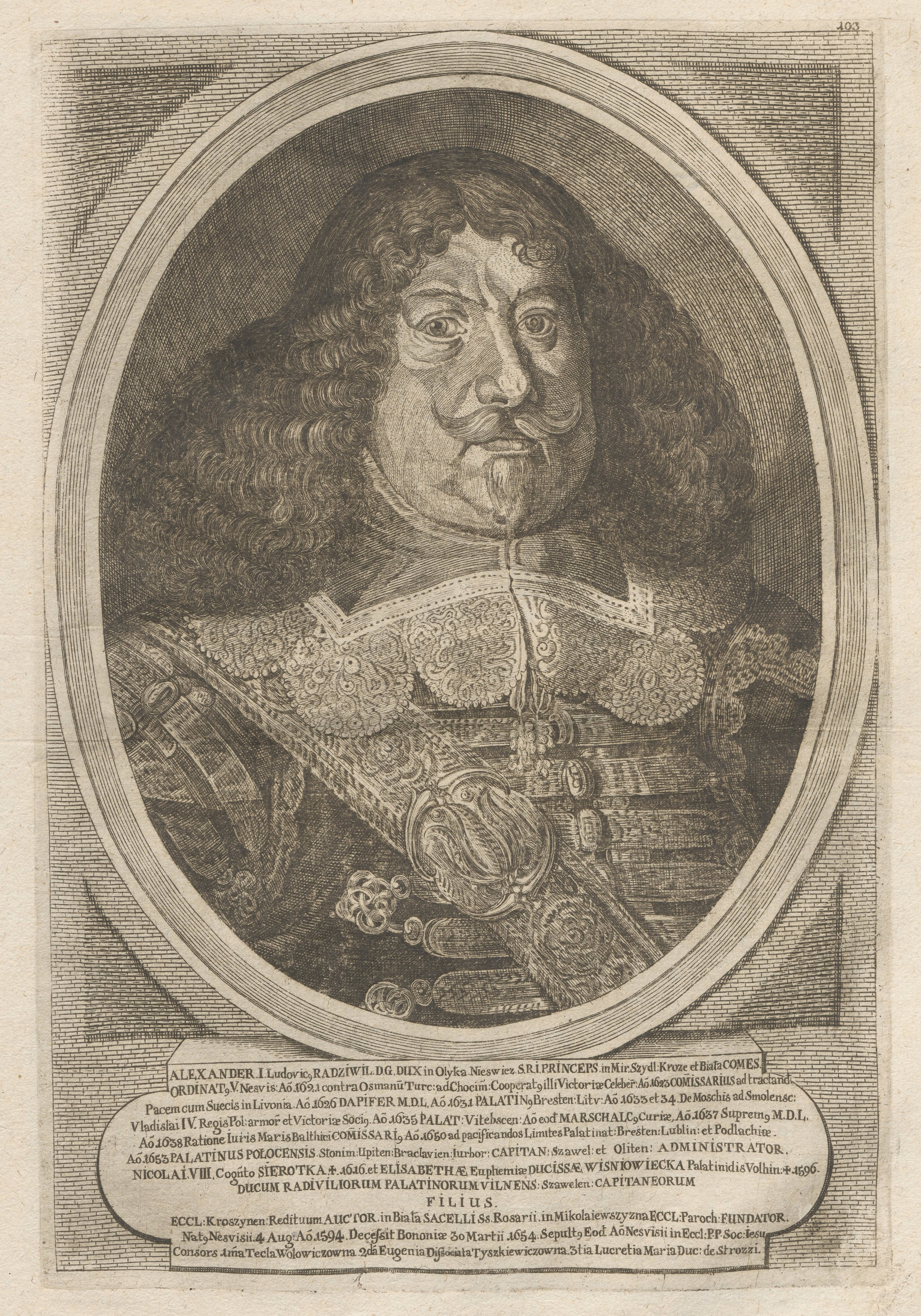 Беларуская (тарашкевіца): Партрэт Аляксандра Людвіка Радзівіла (Alaksandar Ludvik Radzivił)